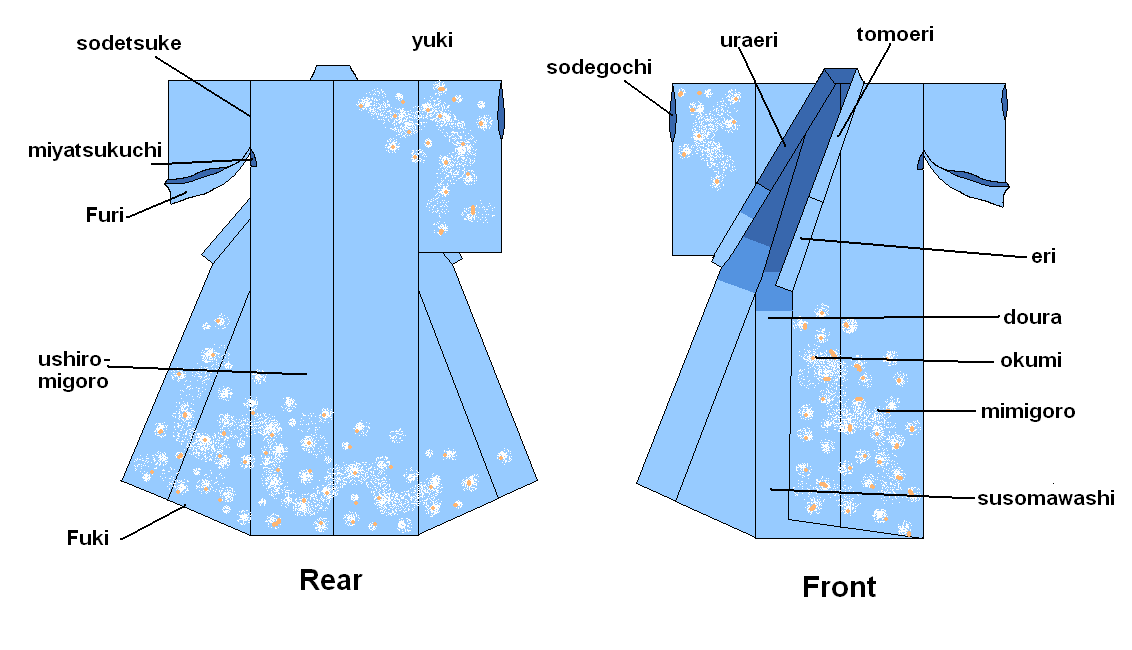 kimono parts